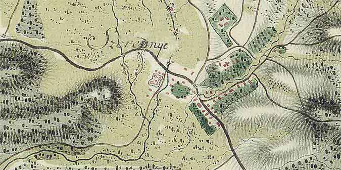 Карта